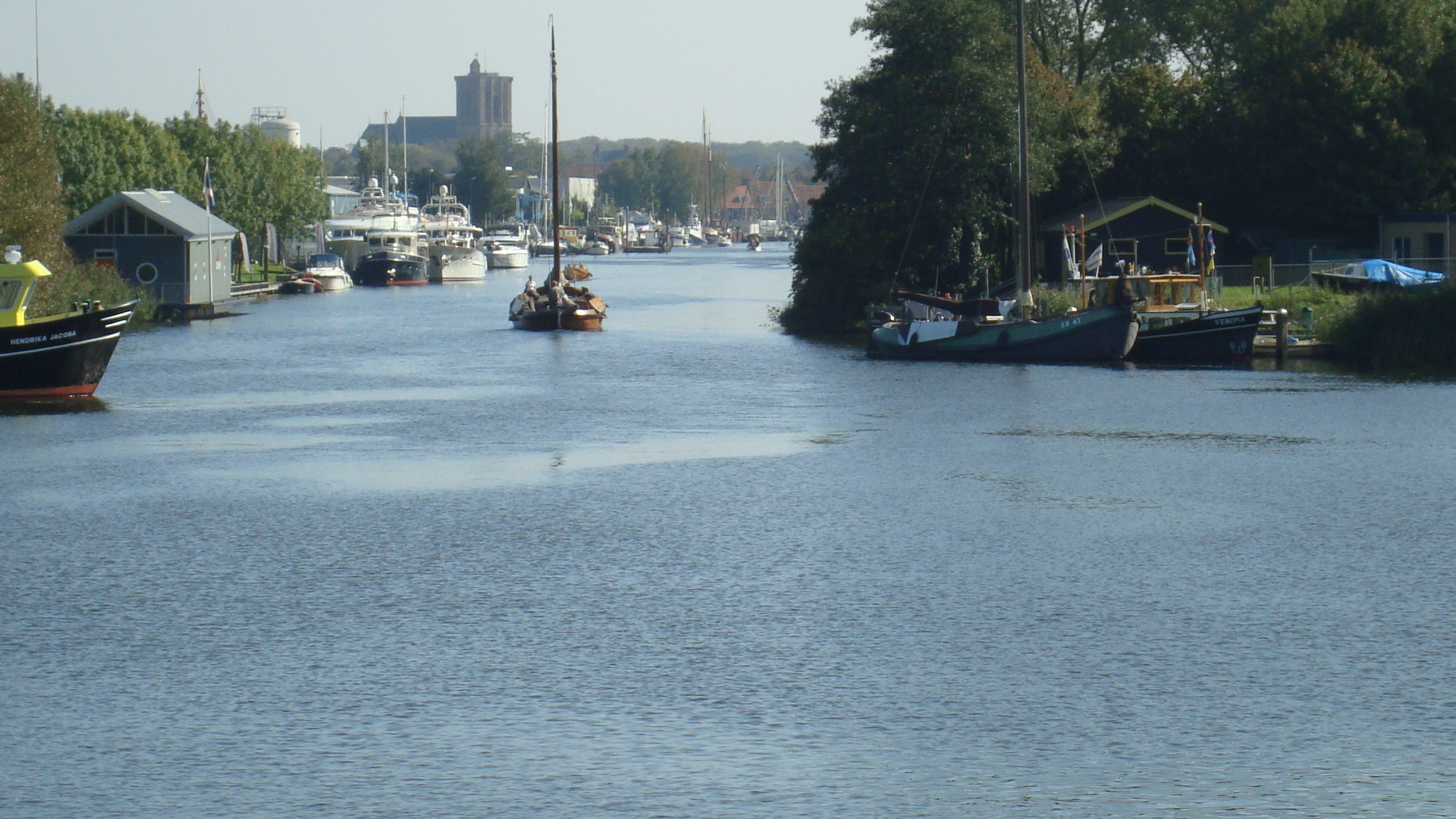 Deze foto is genomen met de rug naar de Kop van 't Ende toe. En geeft een beeld van het havenkanaal in de richting van Elburg.